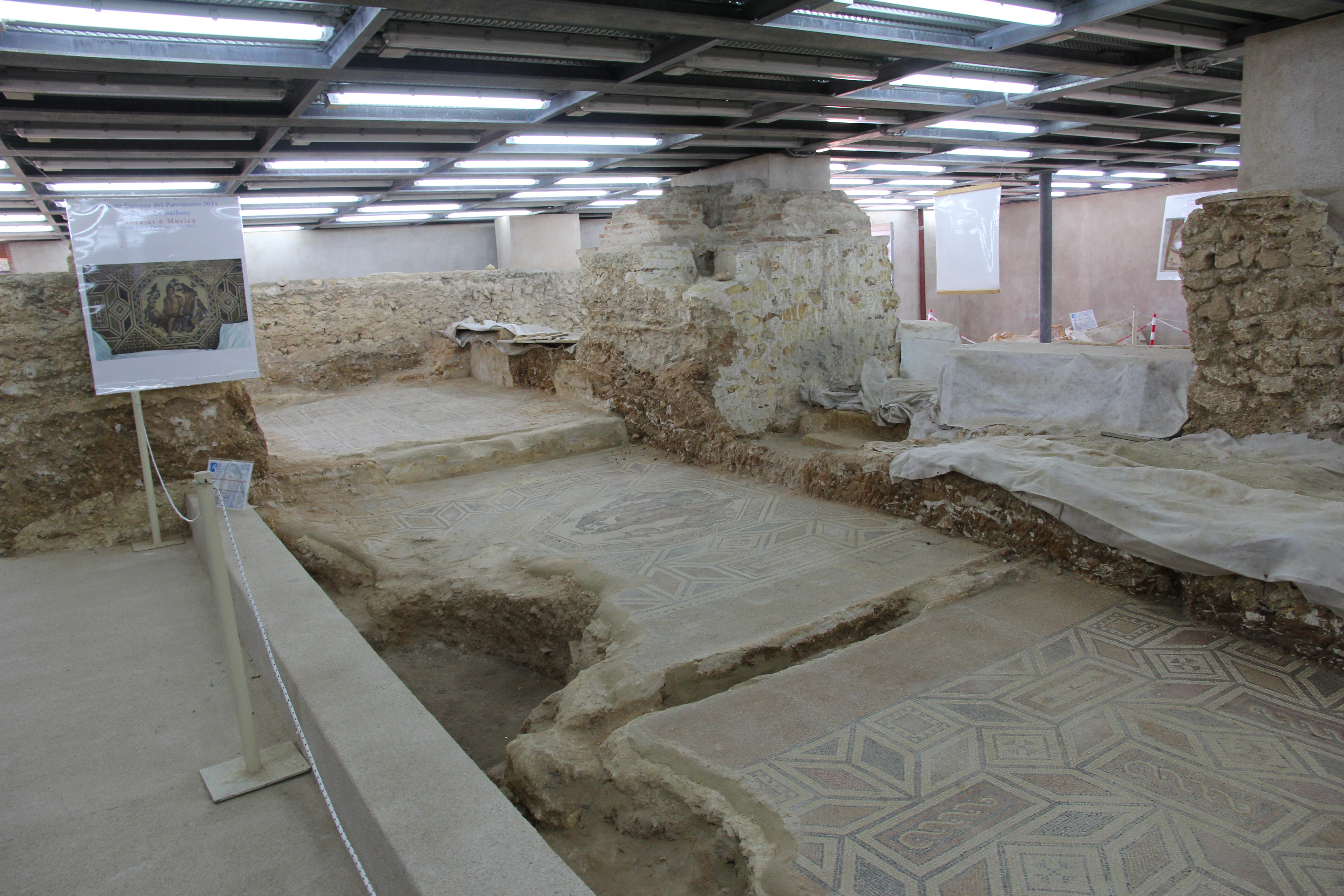 Porto Torres - Domus di Orfeo